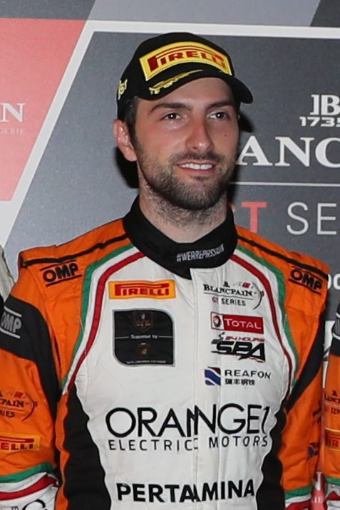 italský jezdec Andrea Caldarelli